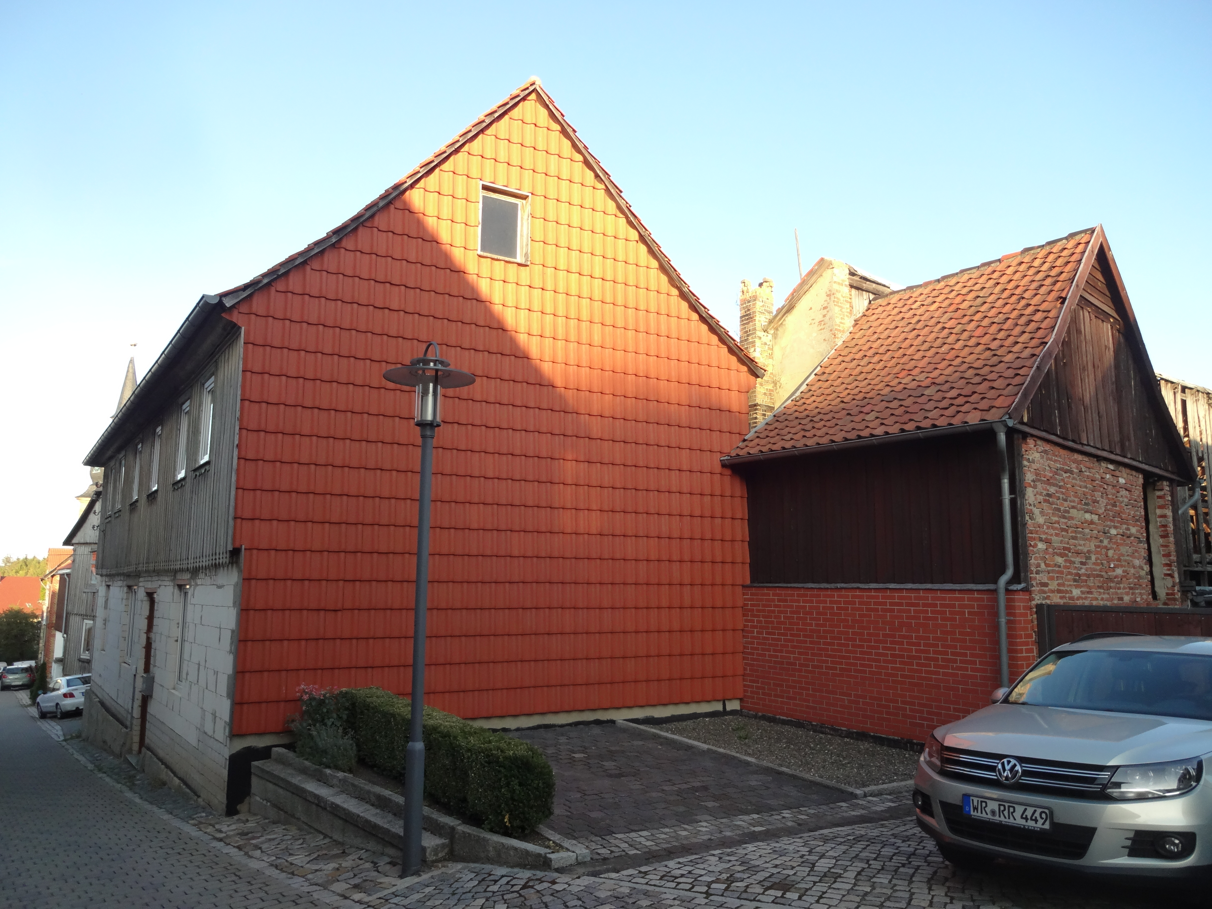 denkmalgeschützter Bauernhof in der Straße Oberdorf 9 in Heimburg